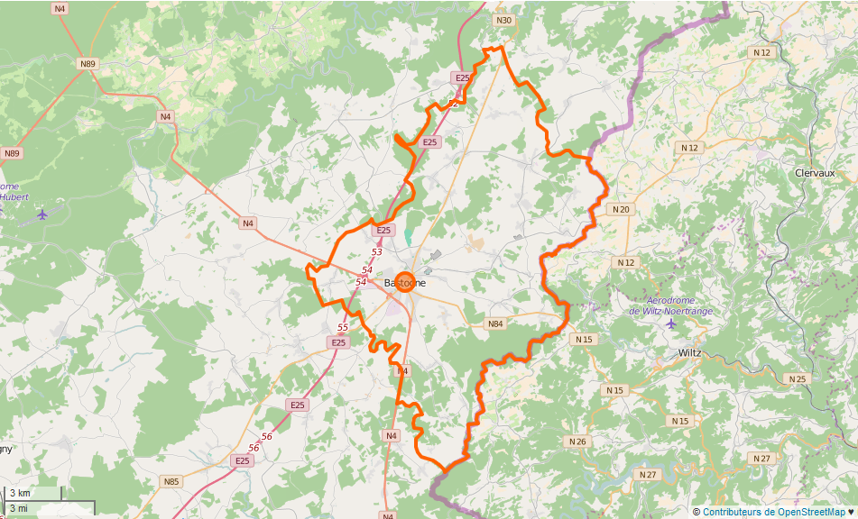 Bastogne Limite communale This map may be incomplete, and may contain errors. Don't rely solely on it for navigation.